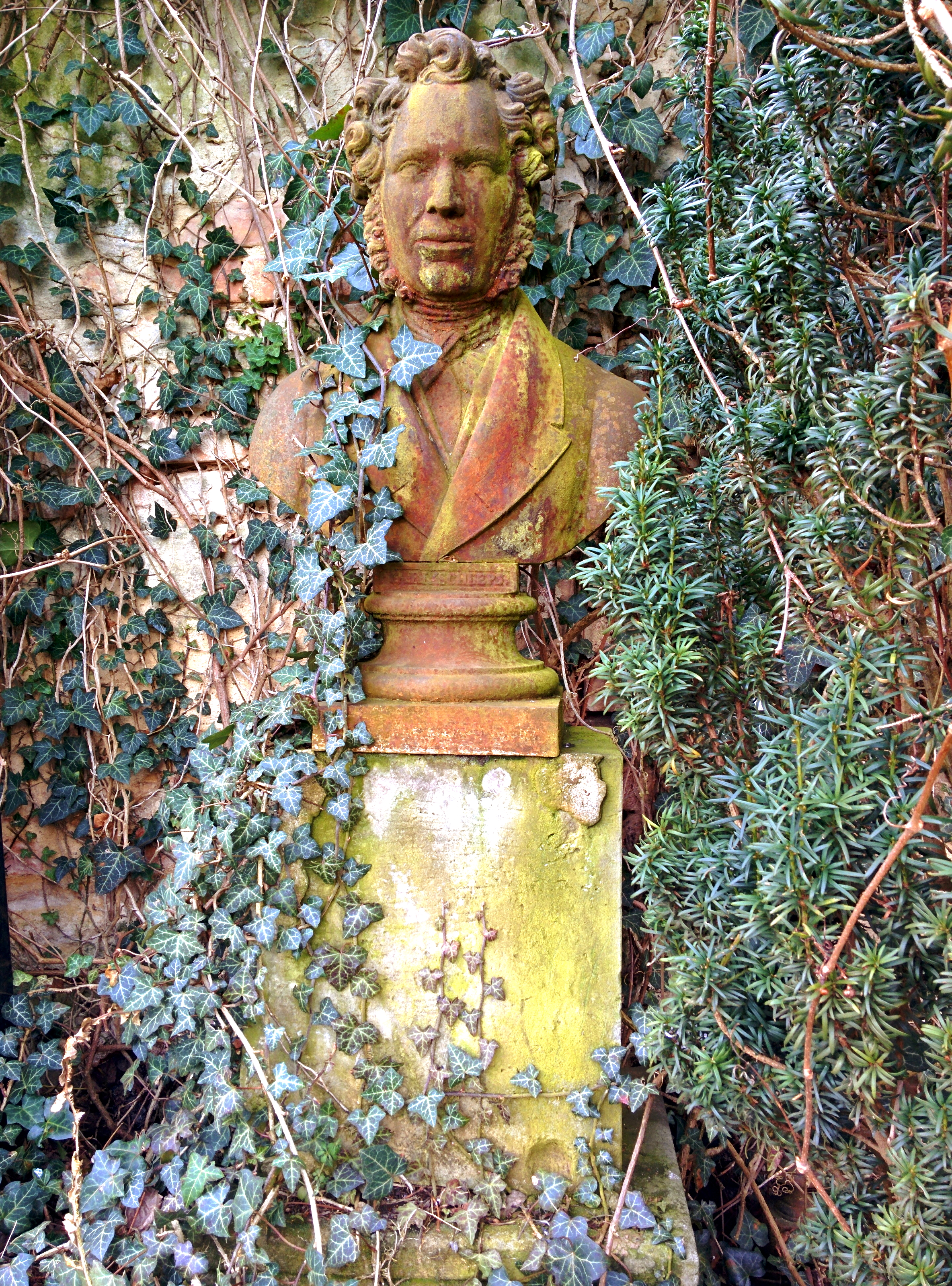 Büste von Karl Schleps